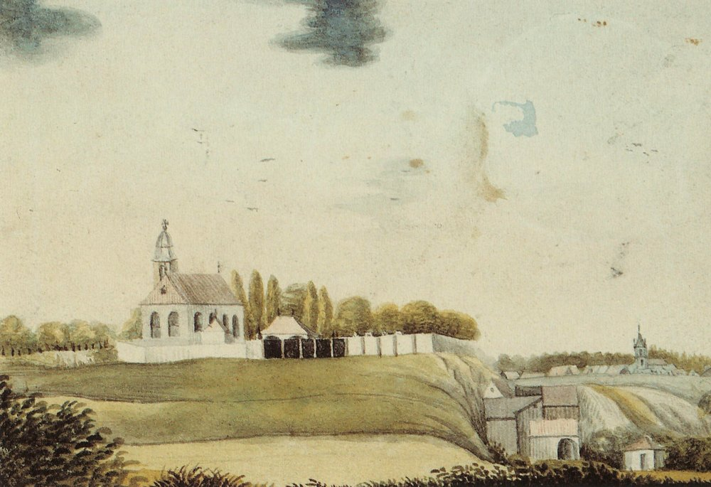 Erlangen. Blick von Norden auf den Neustädter Friedhof, rechts der Frieseleinsgarten, dahinter Bruck.